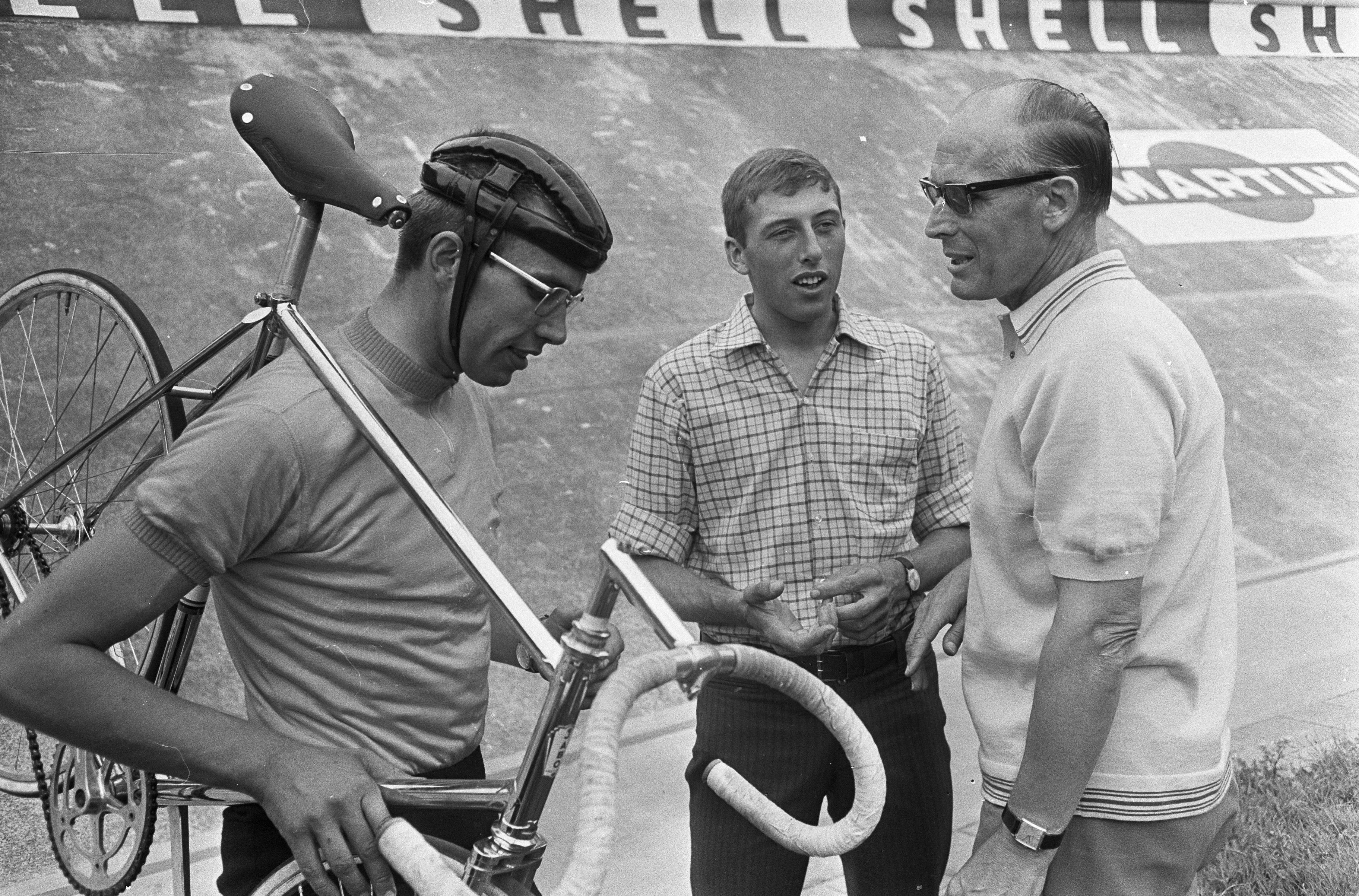 Collectie / Archief : Fotocollectie Anefo Reportage / Serie : [ onbekend ] Beschrijving : Wielrennen. Coach Jan Derksen (rechts) in gesprek met Gert Bongers (links) en Piet de Wit (midden) / Datum : 21 augustus 1967 Trefwoorden : WIELRENNEN, gesprekken Persoonsnaam : Derksen, Jan, Gert Bongers, Wit, Piet de Fotograaf : Koch, Eric / Anefo Auteursrechthebbende : Nationaal Archief Materiaalsoort : Negatief (zwart/wit) Nummer archiefinventaris : bekijk toegang 2.24.01.05 Bestanddeelnummer : 920-6275